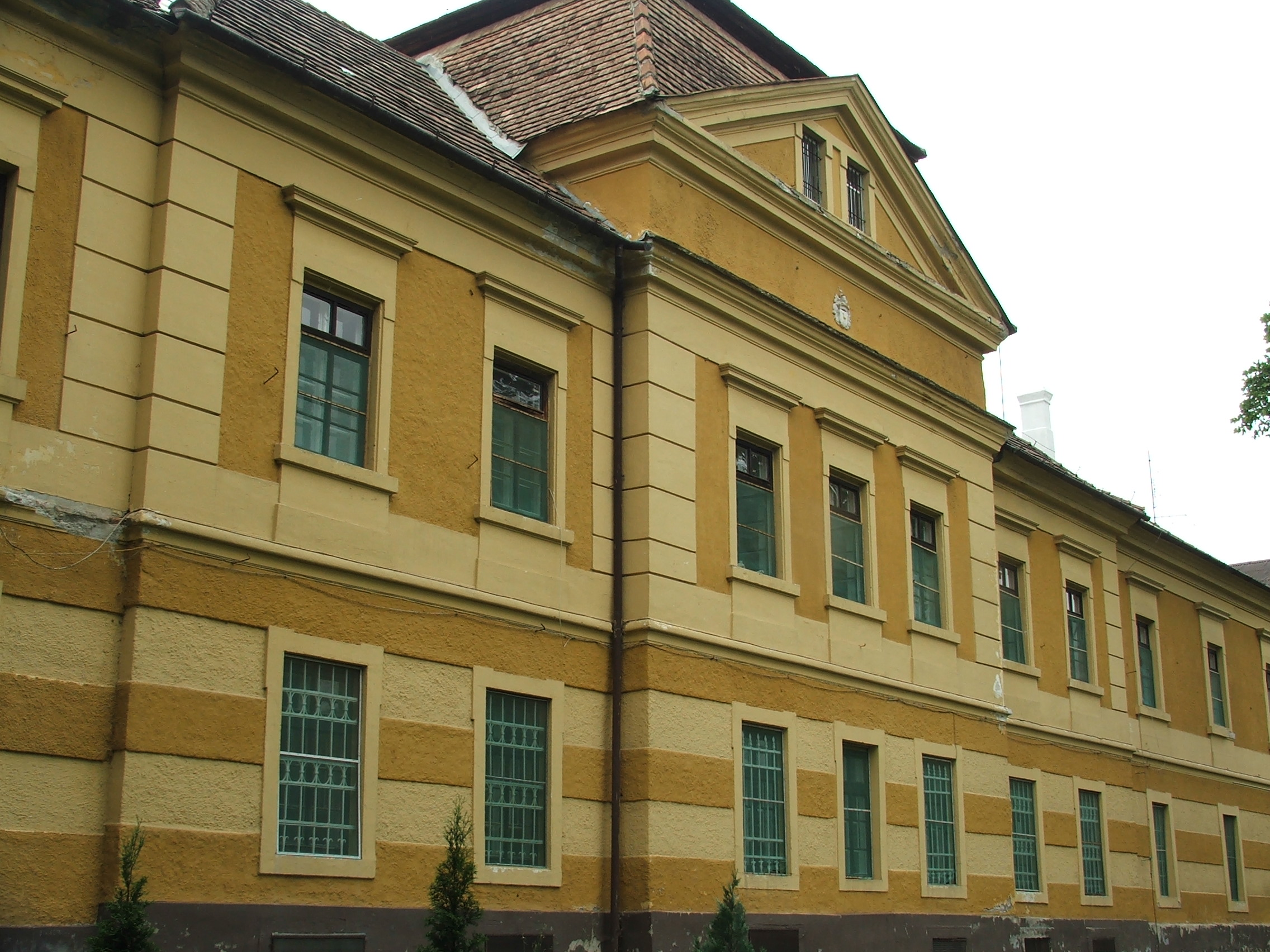 Nedeczky-kastély, Lesencetomaj This is a photo of a monument in Hungary. Identifier: 9970